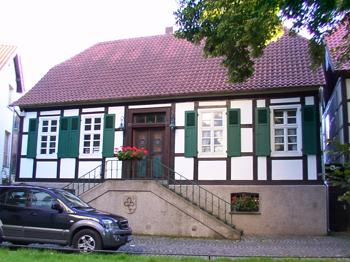 Salzkotten: Klingelstraße 6, Alte Mädchenschule, heute Heimathaus This is a photograph of an architectural monument.